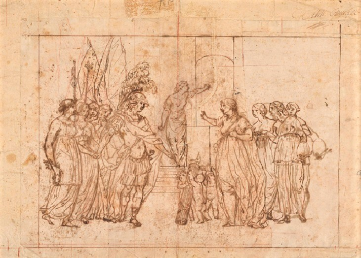 "Scena romana", penna e inchiostro bruno su carta e gesso rosso, 21 x 29.7 cm., coll. Cooper Hewitt